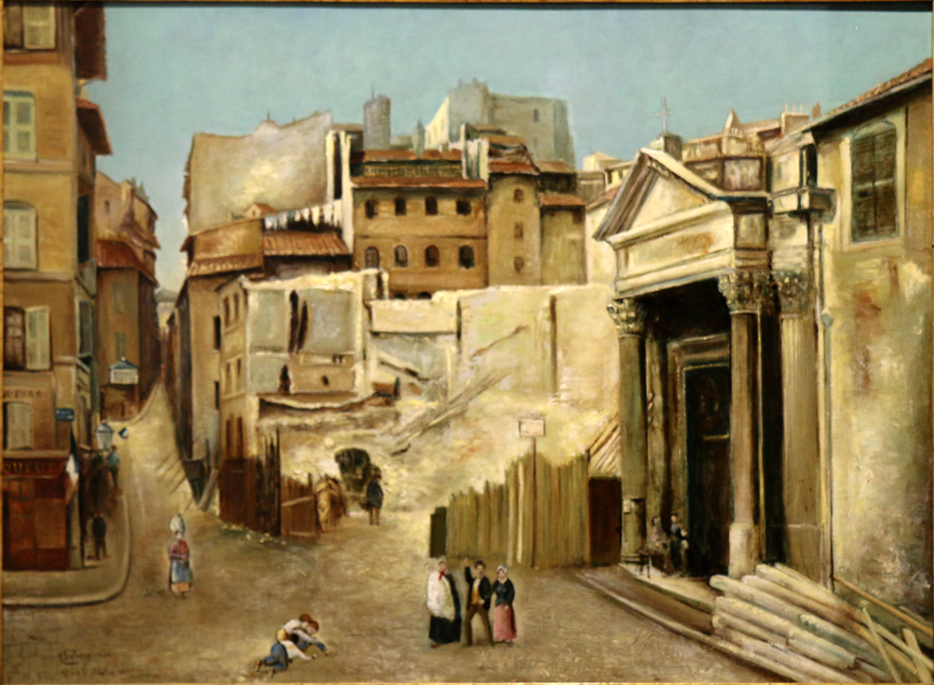 Peinture du XIX° siècle représentant l'église Saint-martin de Marseille avant sa démolition en 1887.